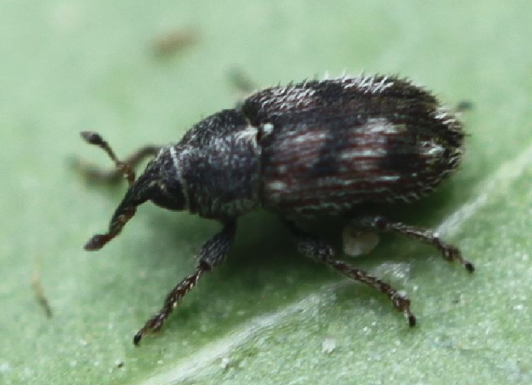 Schrägbinden-Gallenrüssler (Mecinus labilis) am 20. Januar 2020 an einem Platanenstamm in Walldorf/Baden